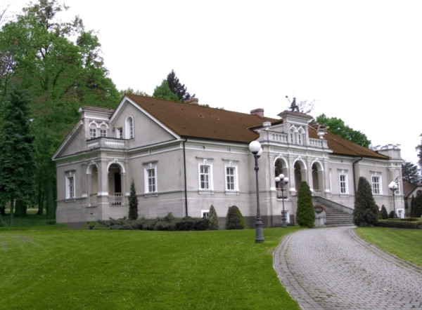 Klecza Górna - zespół dworsko-parkowy: dwór (zabytek nr A-871/M)